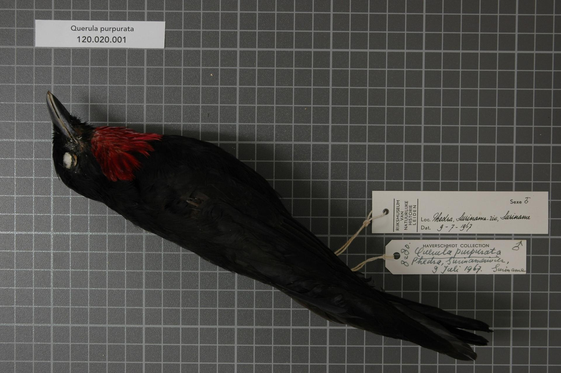 Querula purpurata (P.L.S. Muller, 1776)